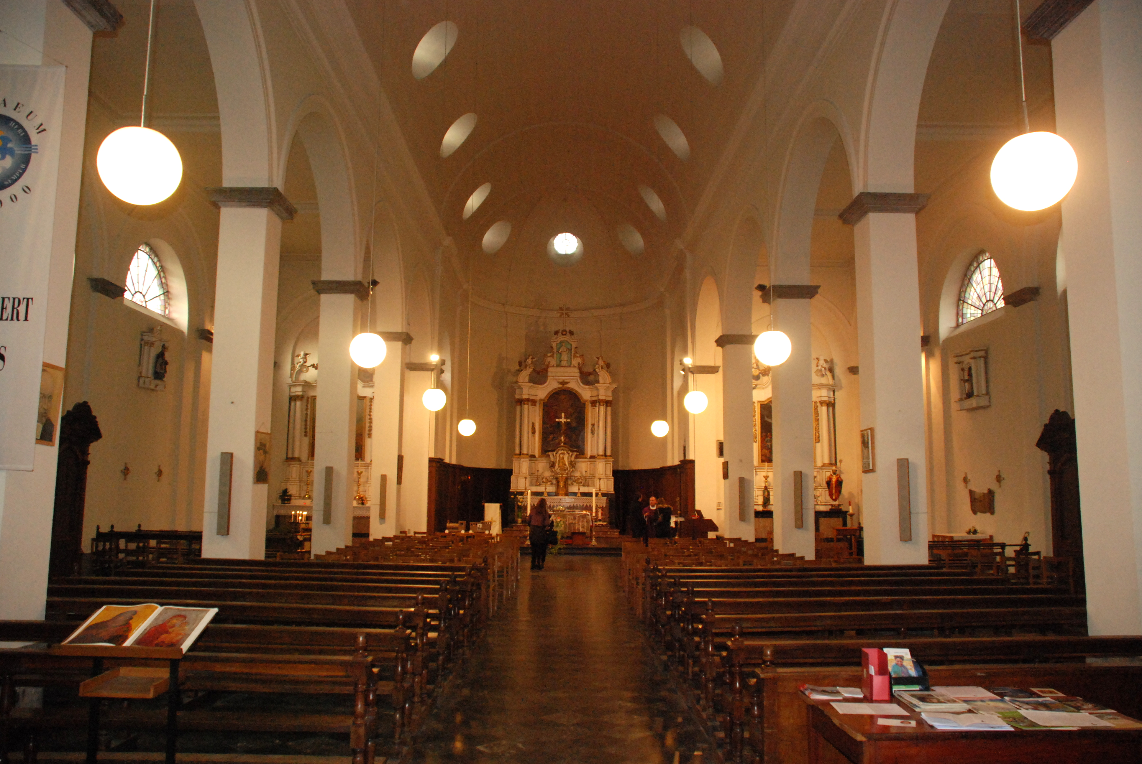 Belgique - Province de Namur - Viroinval - Nismes - église Saint-Lambert (1829)